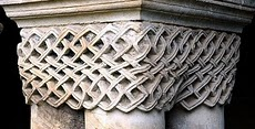 Arcion Medieval en la Catedral